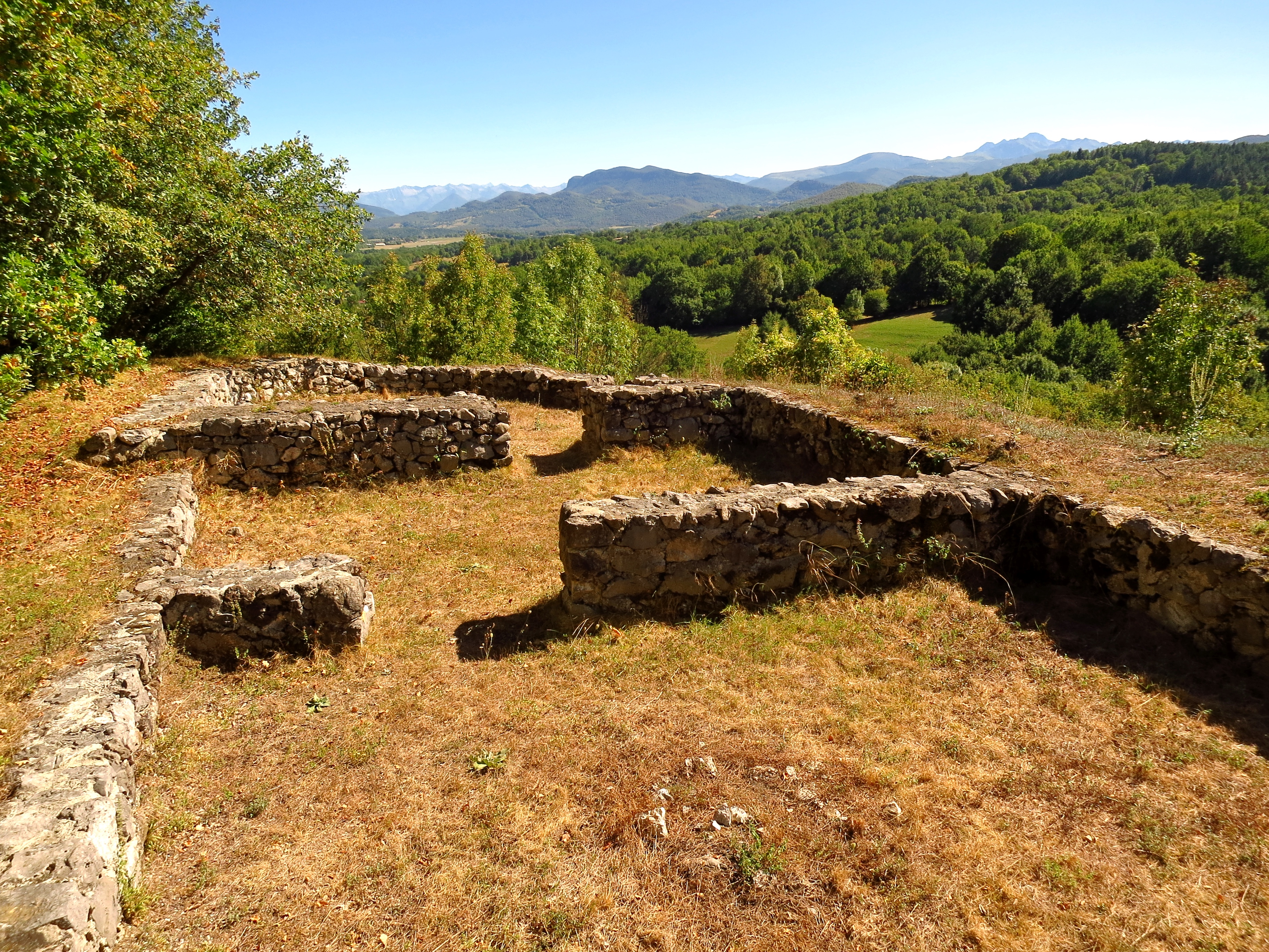 Caumont (Ariège, France) - Ruines du castrum.